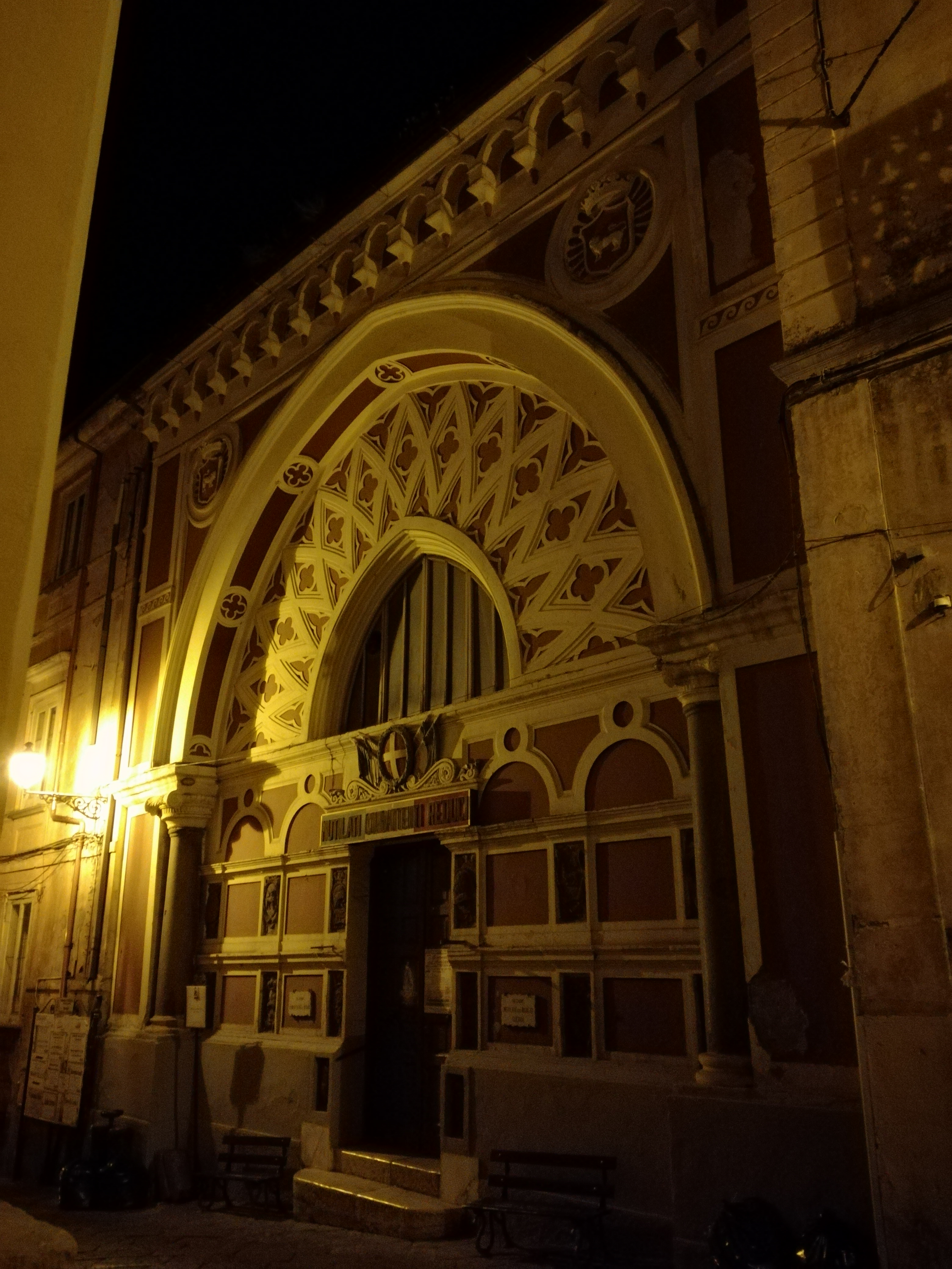 Sedile di San Matteo di Sessa Aurunca, risalente al XV secolo